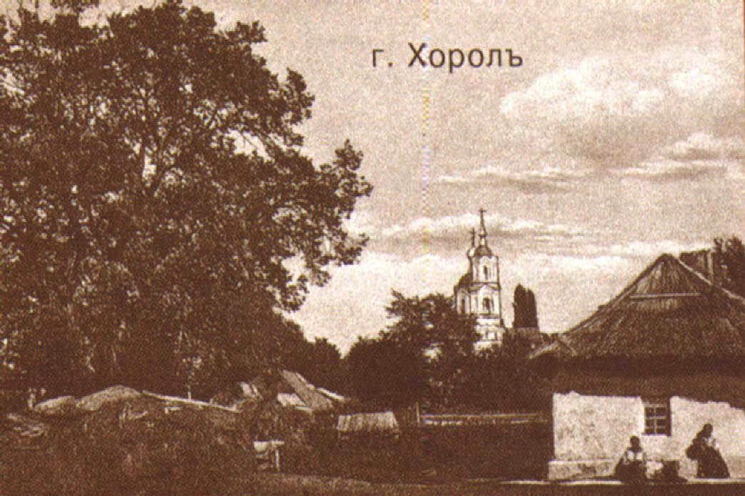 Старе місто вид Петропавлівської церкви. З фото В.М. Маковського